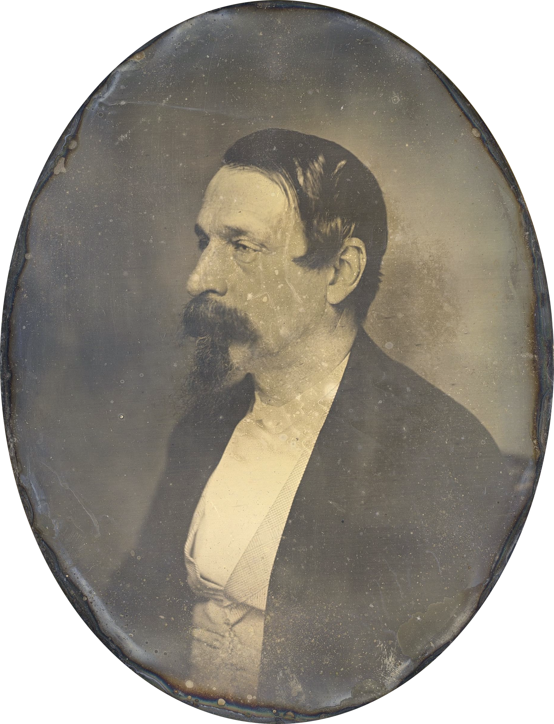 Daguerréotype de Louis-Napoléon Bonaparte.